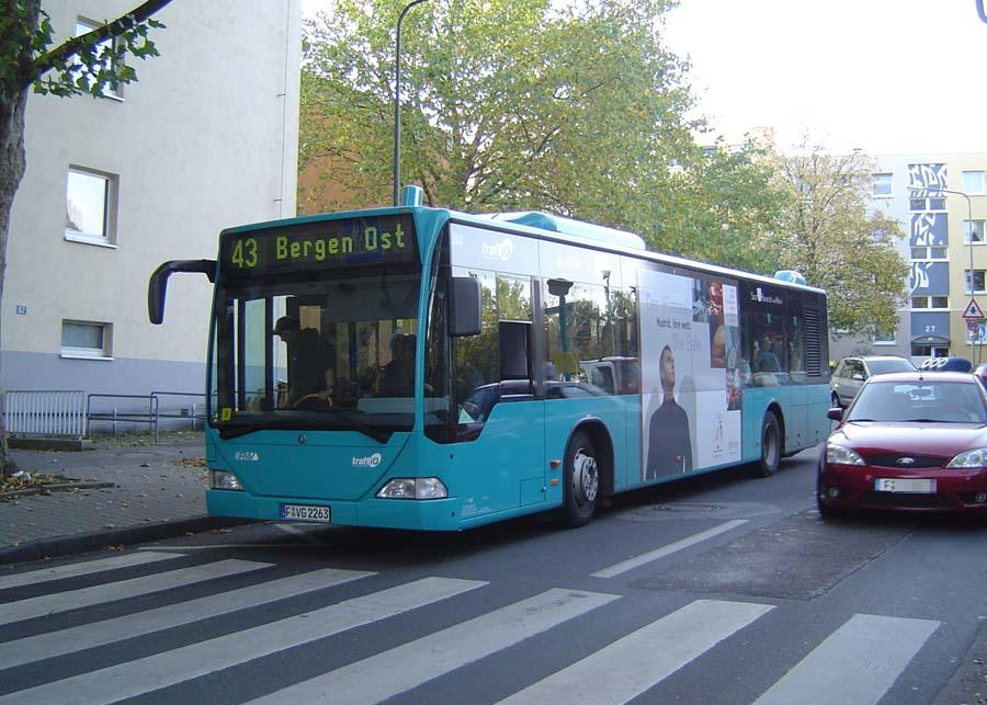 Mercedes-Benz O 530 N3 - Citaro mit Frankfurt-Linienbündel D Beklebung